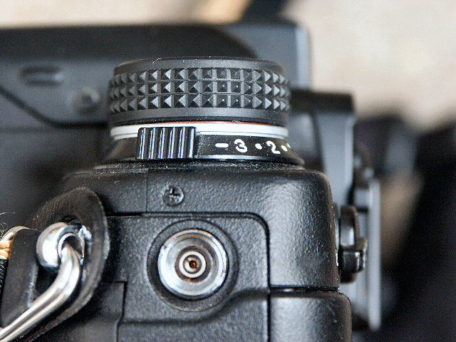 Motiv: Minolta Dynax 9 - Blitzsynchronanschluss (rechte Seite) Aufnahmedatum: 23-Aug-2004 Fotografiert mit: Minolta Dimage 7 Hi